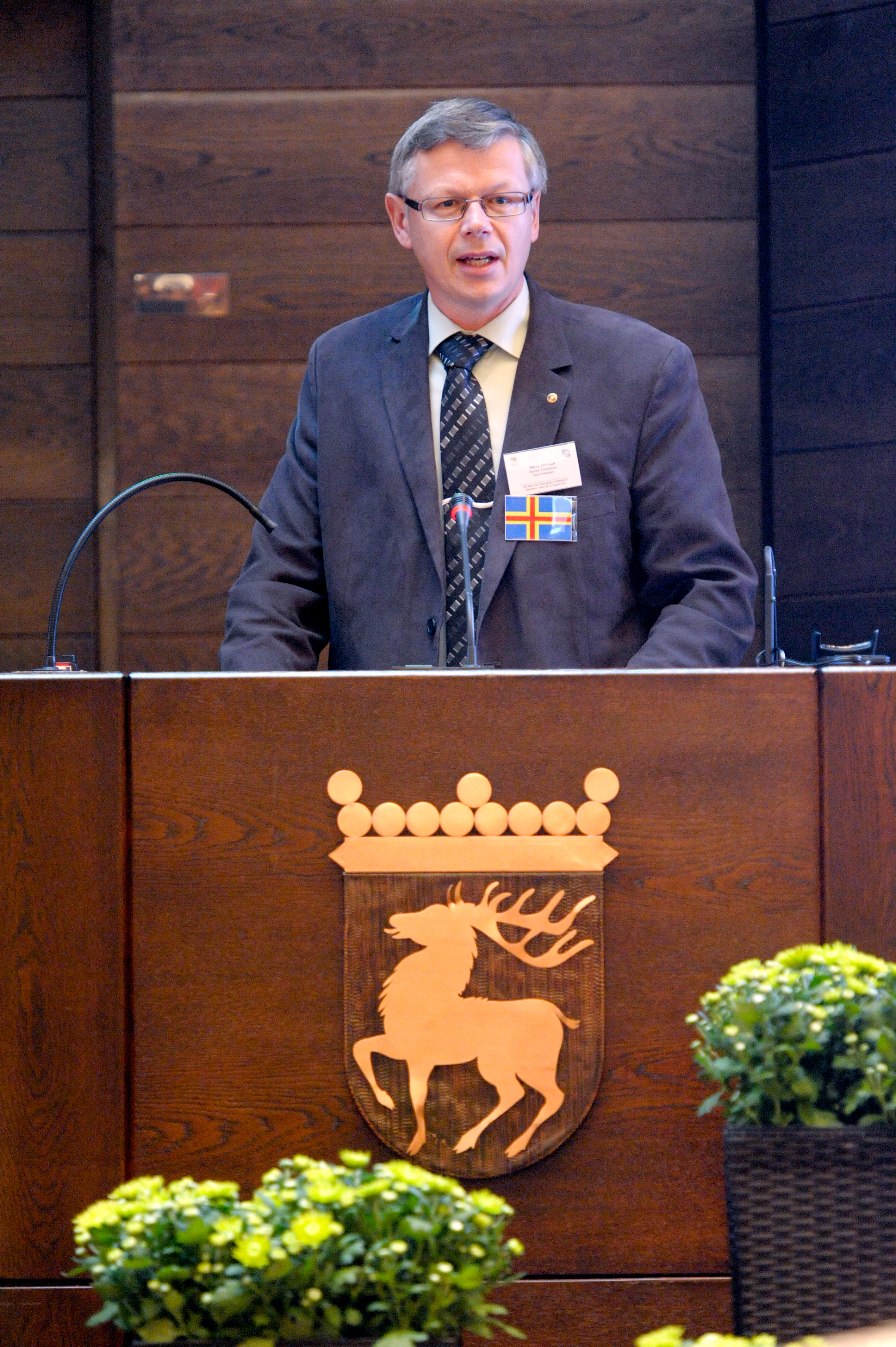 Harry Jansson BSPC 19 Mariehamn Åland